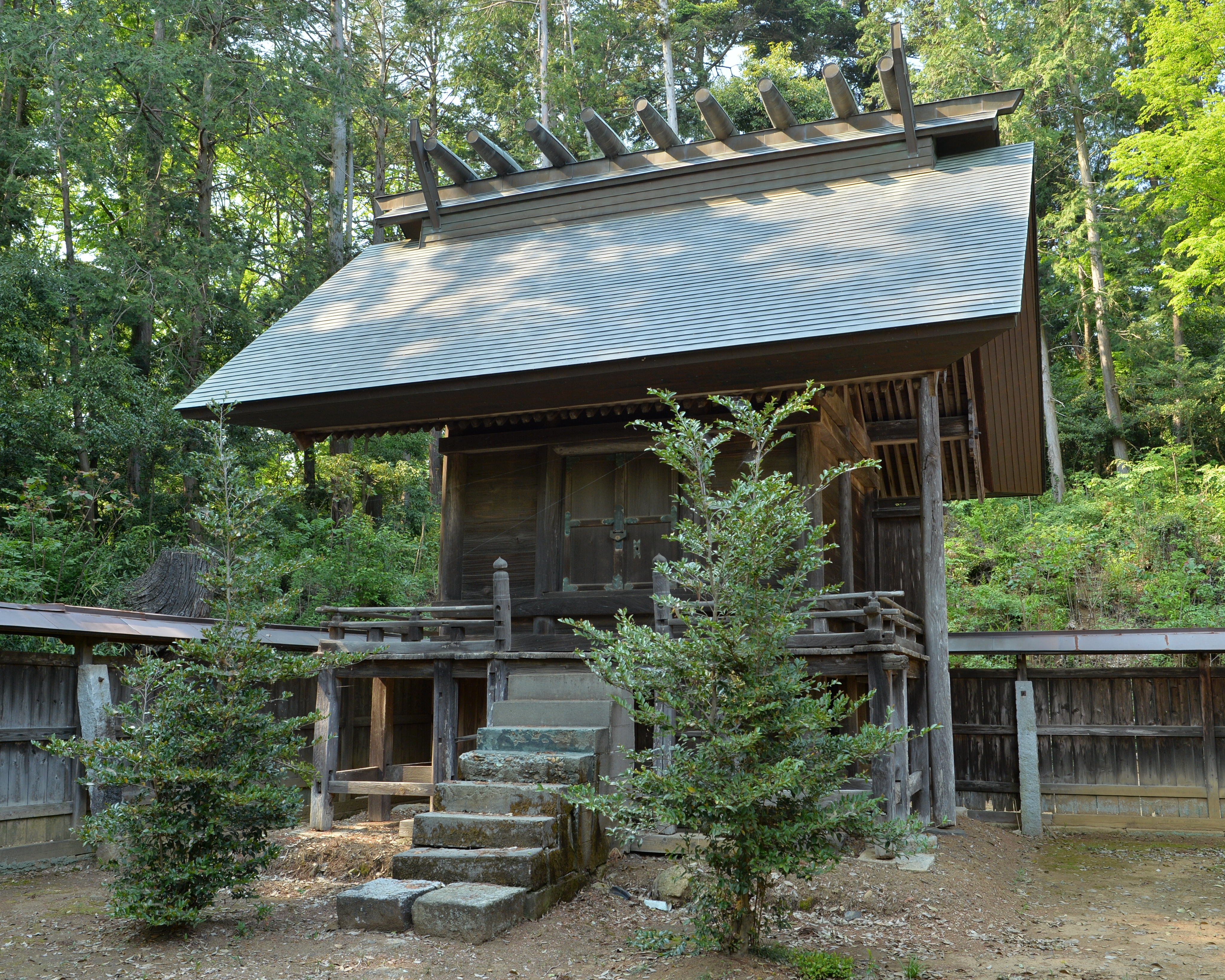 内外大神宮の本殿は左側に外宮本殿・豊受大神を祀る。国の重要文化財。延宝7年（1679年）建立。